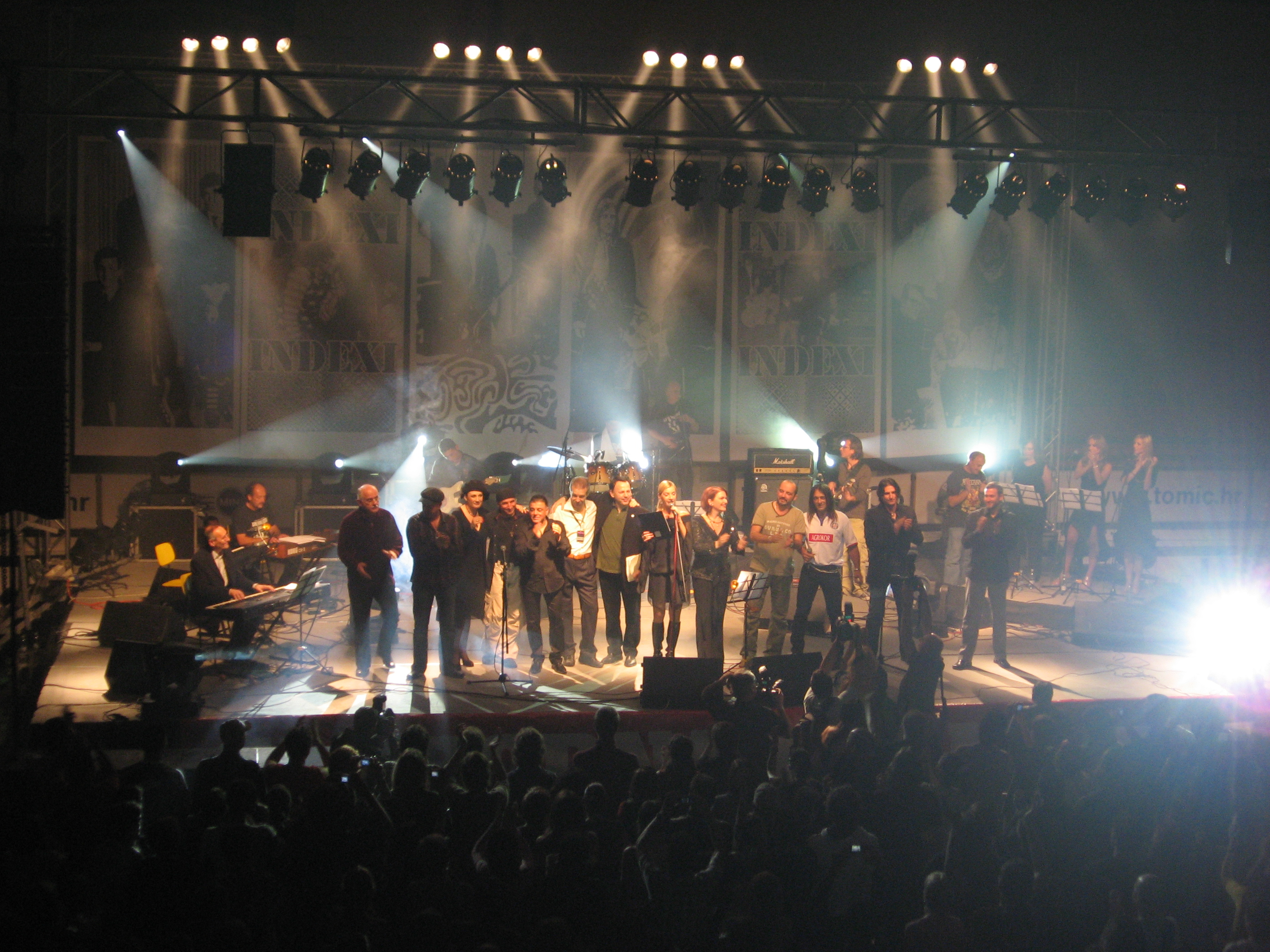 Indexi i prijatelji 7.10.2007., spomen-koncert u Splitu